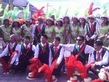 muestra a la Cuadrilla de la Seccion Segunda, Carnaval 2010 Tenancingo Tlaxcala.